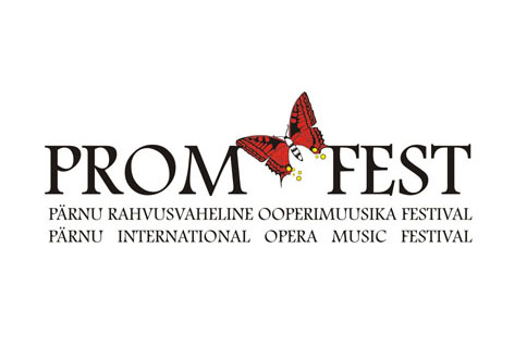 Pärnu Rahvusvaheline Ooperimuusika Festival – PromFest – logo